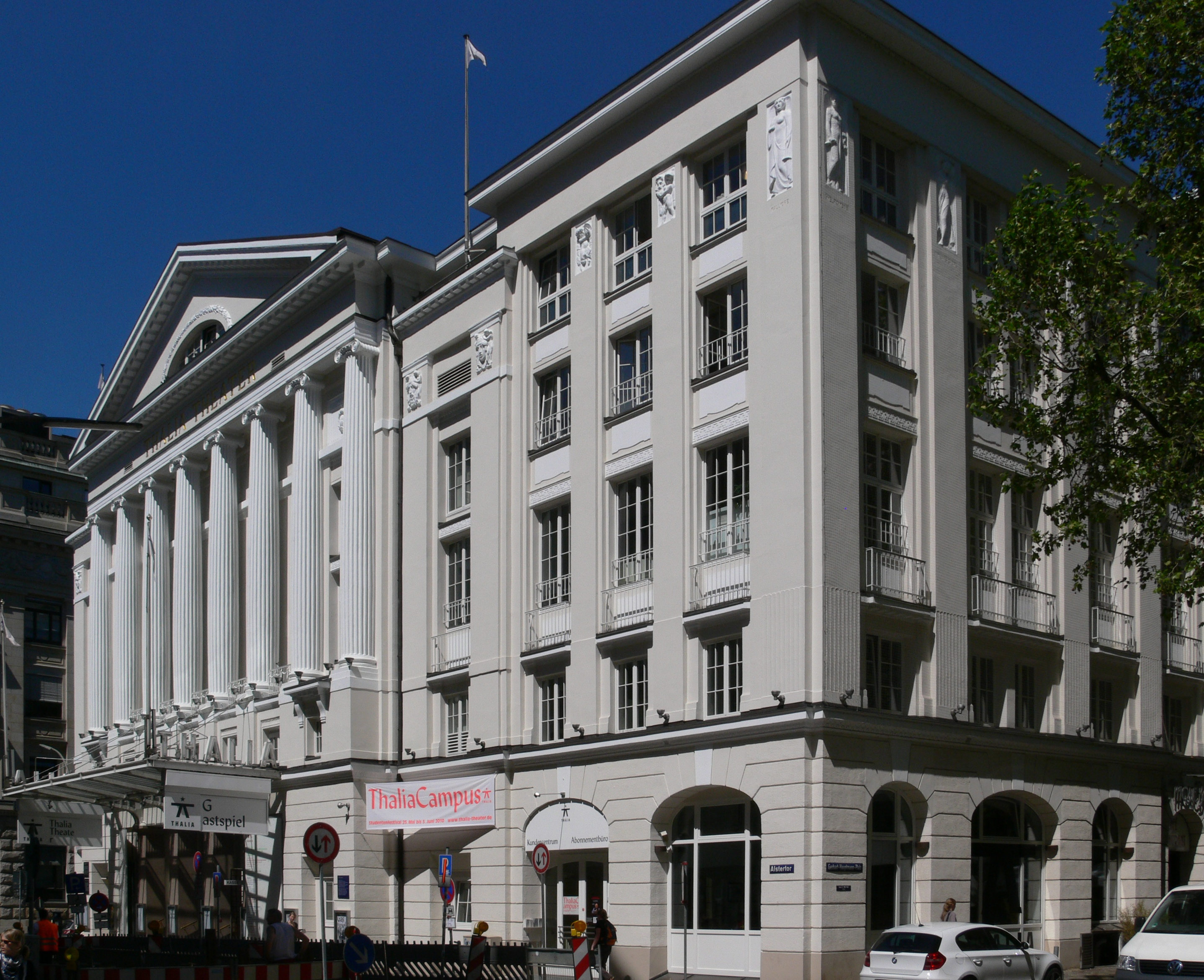 Hamburg, Thalia-Theater This is a photograph of an architectural monument.